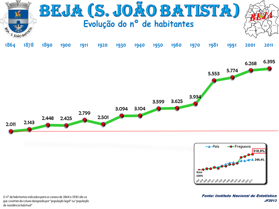 Evolução da População 1864 / 2011